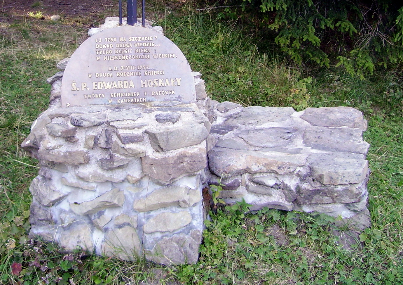 Turbacz, Edward Moskała